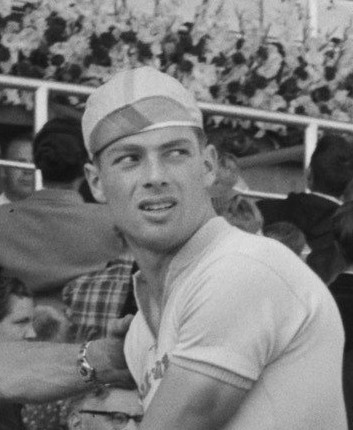 Start Ronde van Nederland Stadion Utrecht . Duitse ploeg (Continental) kopman Gunter Pankoke